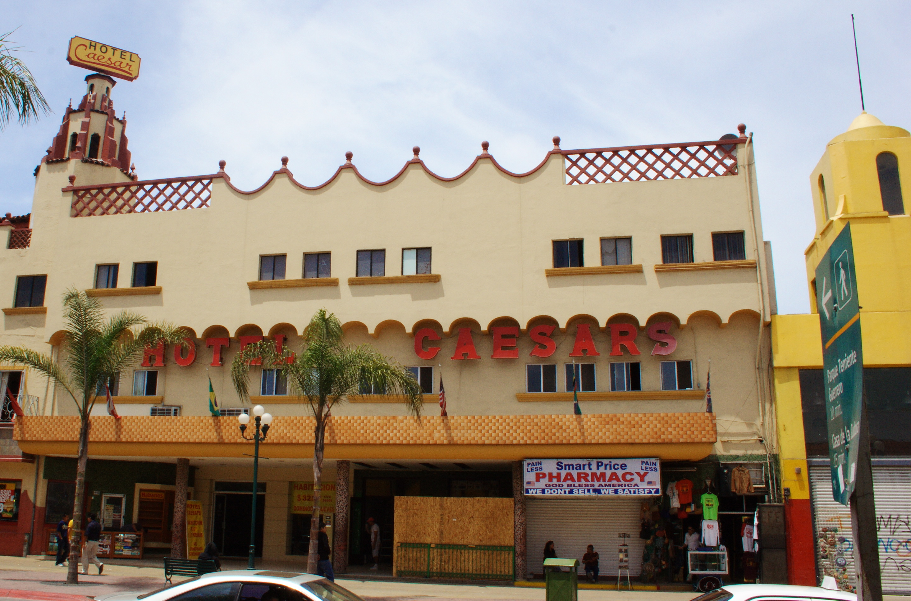 a trip to tj